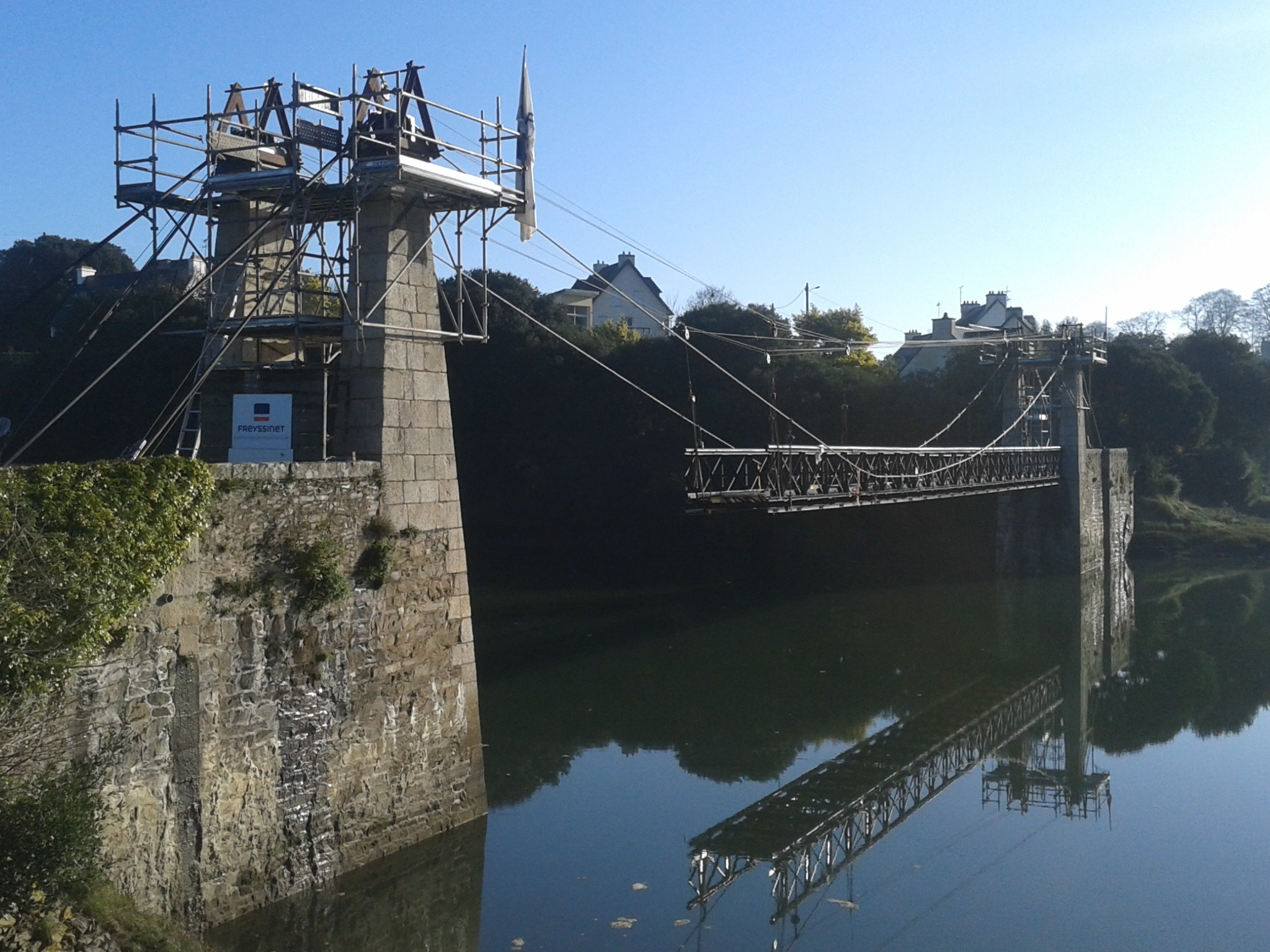 Pose du tablier de la passerelle Saint-François, février 2013.